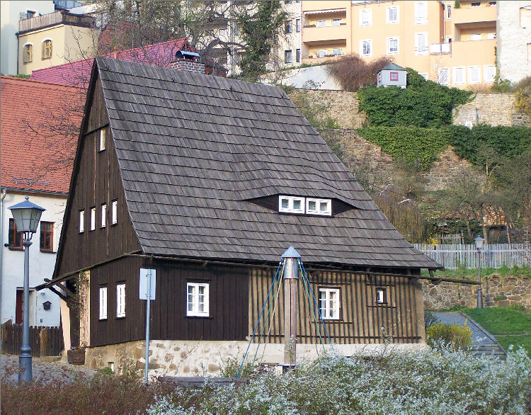 Hexenhäusel in Bautzen, erbaut vor 1634, auch Hexenhäusl